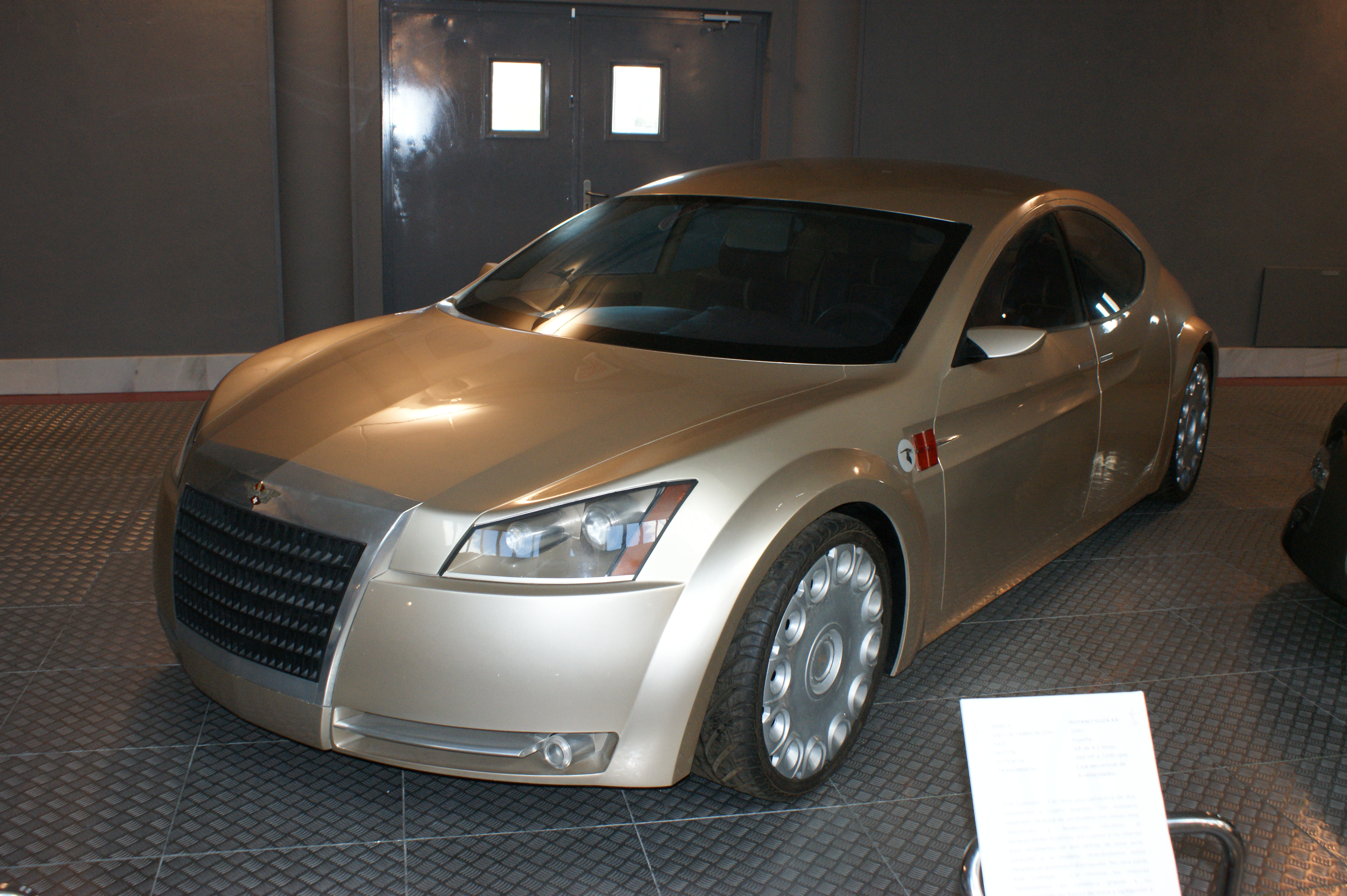 2001 Hispano-Suiza K8, 4.2 litre V8, at the Salamanca Motor Museum, 04/08.